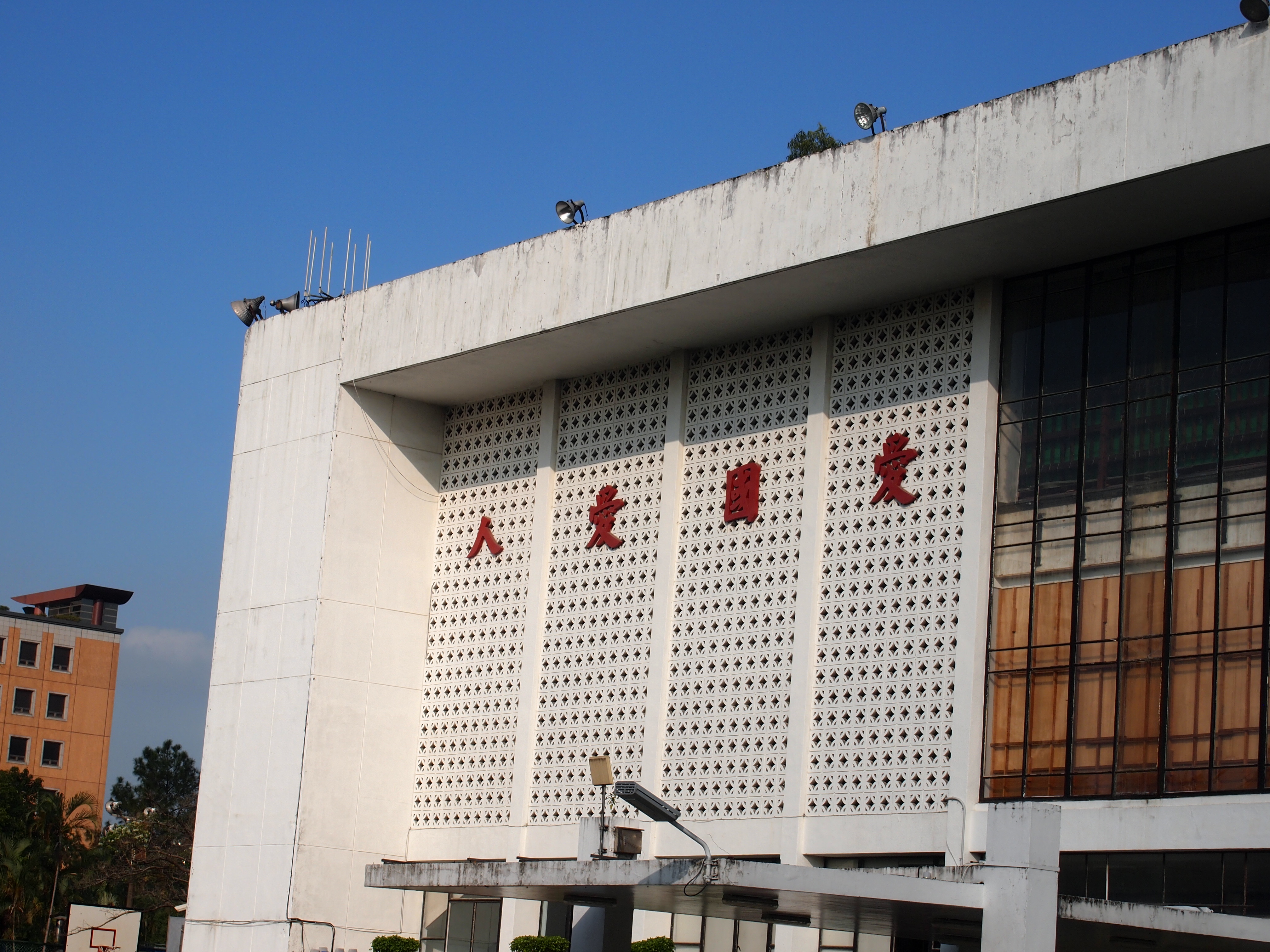 台大校訓-愛國愛人